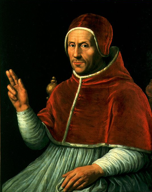 Pope Adrian VI (Hadrian VI) (1459-1523)